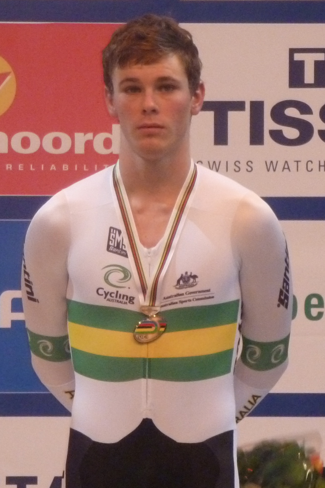 Michael Hepburn, australischer Radrennfahrer